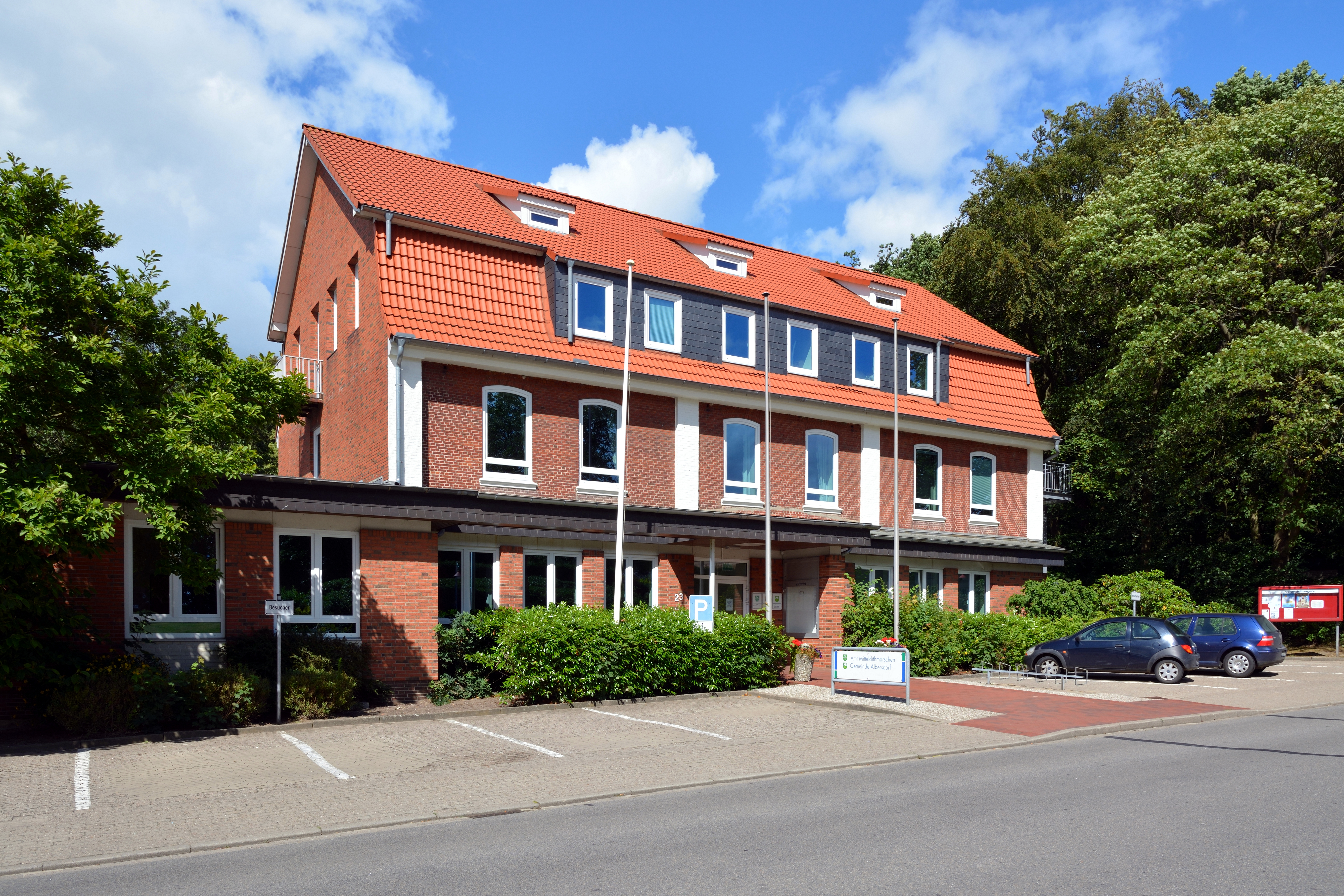 Das Amt Mitteldithmarschen in Alberdorf.